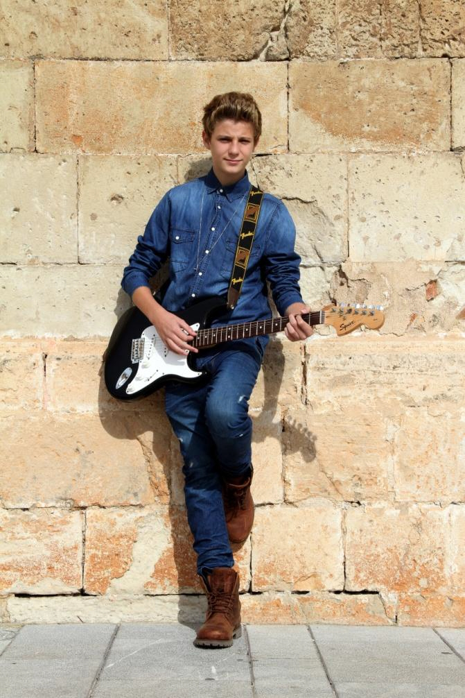 Calum con su guitarra